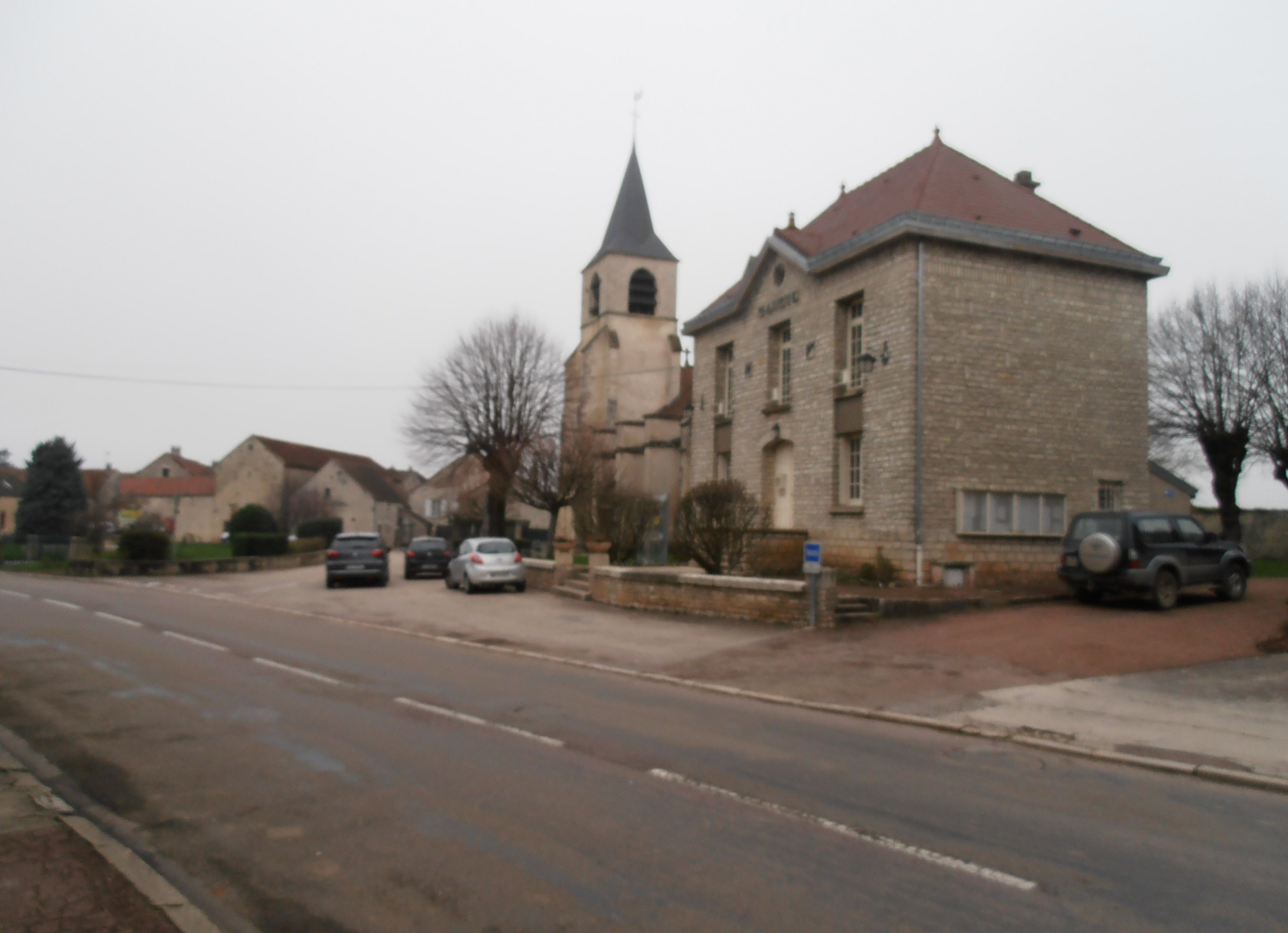 Église Saint-Christophe de Nitry .